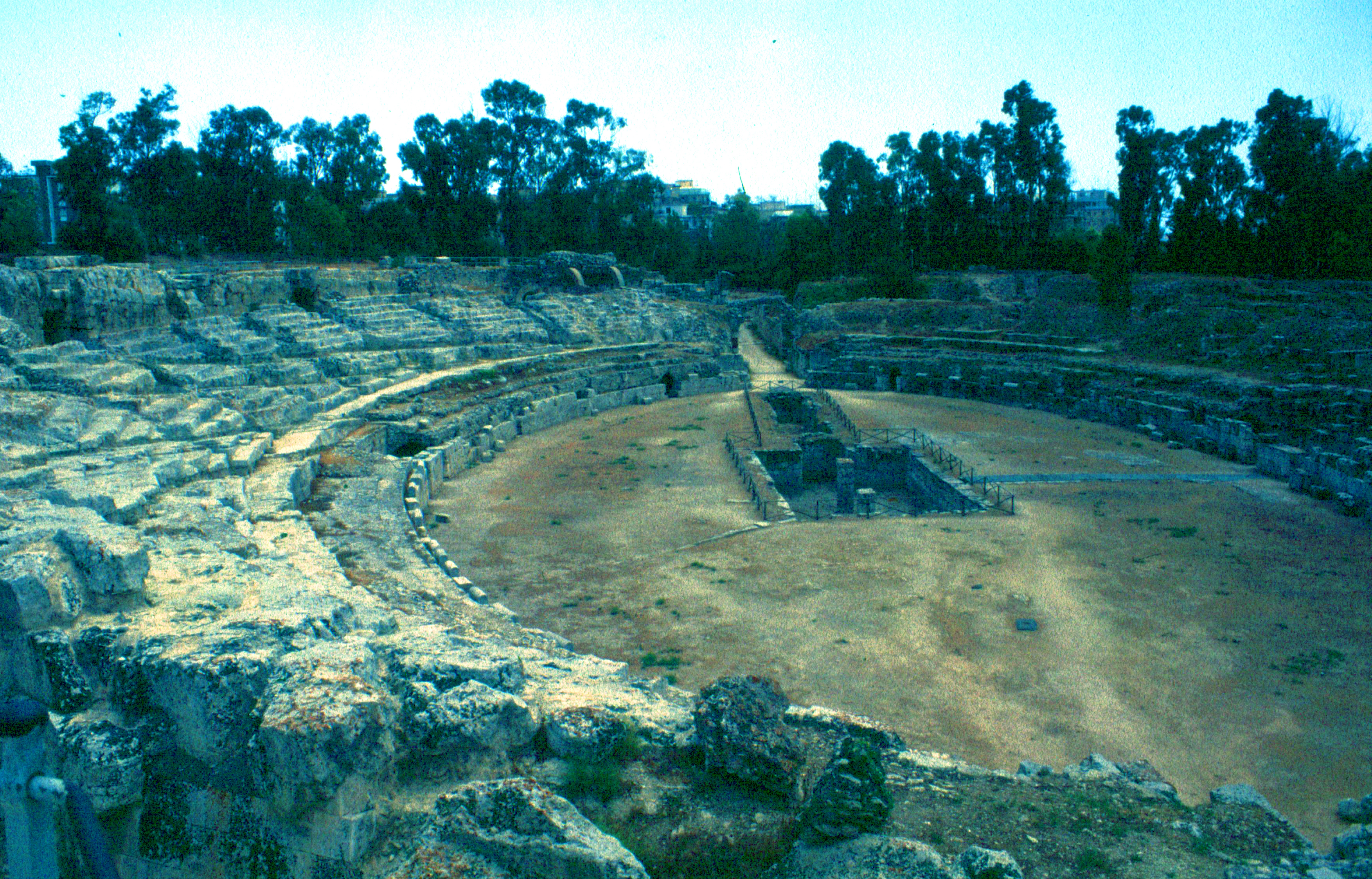 Siracusa, Sizilien